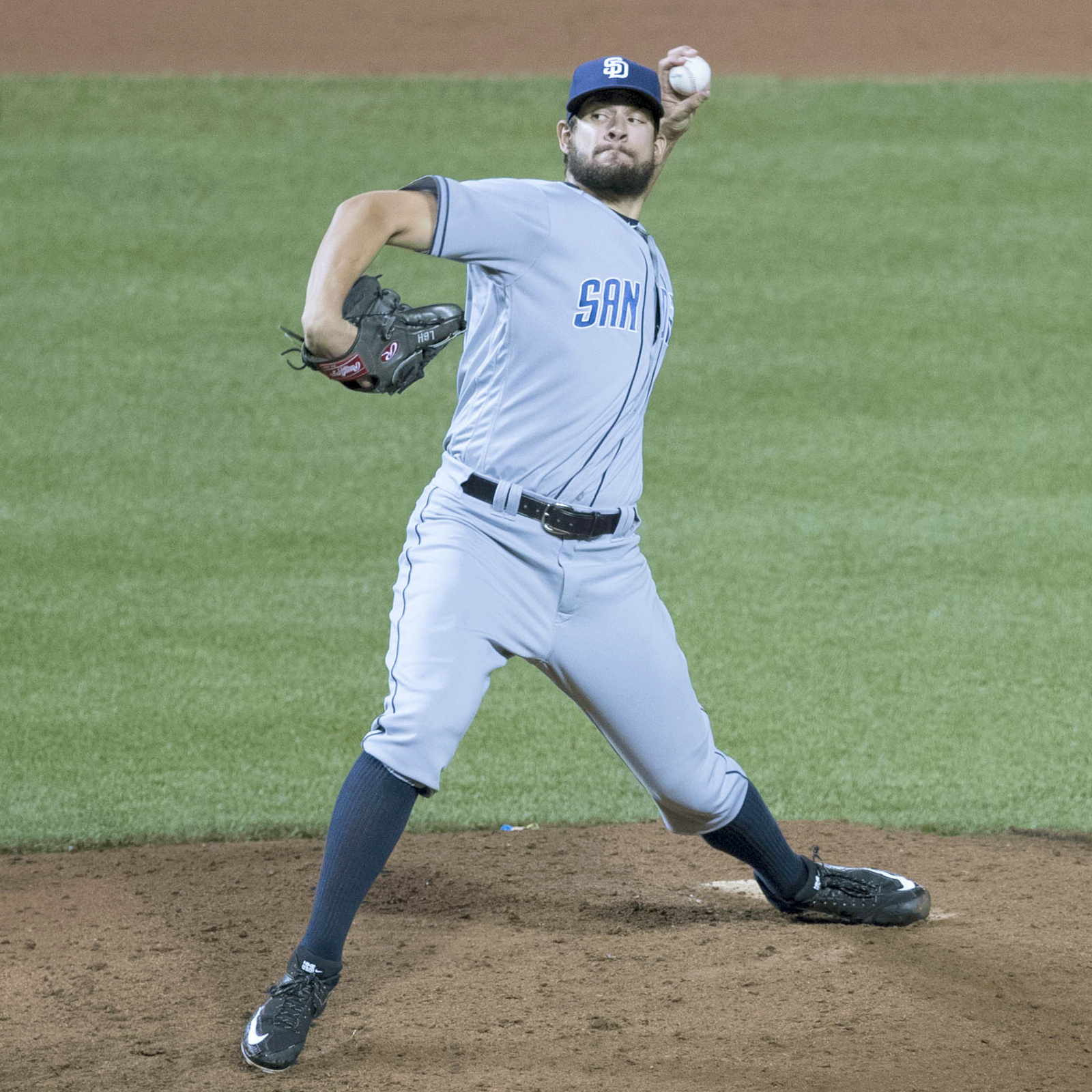 Brad Hand